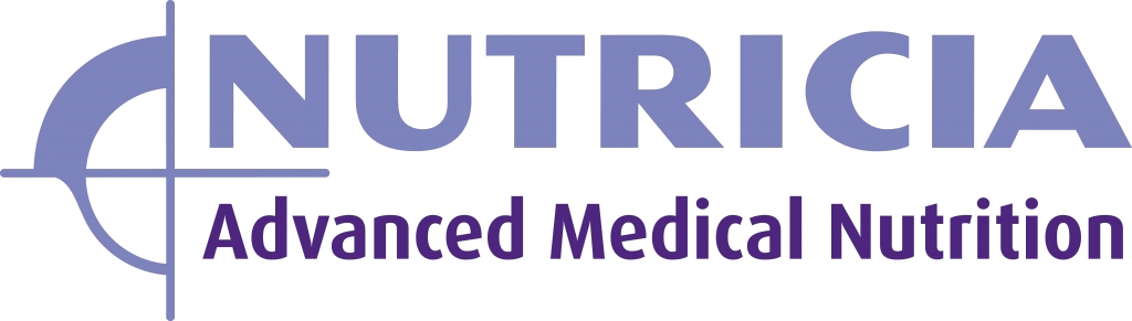 Ehemaliges Logo